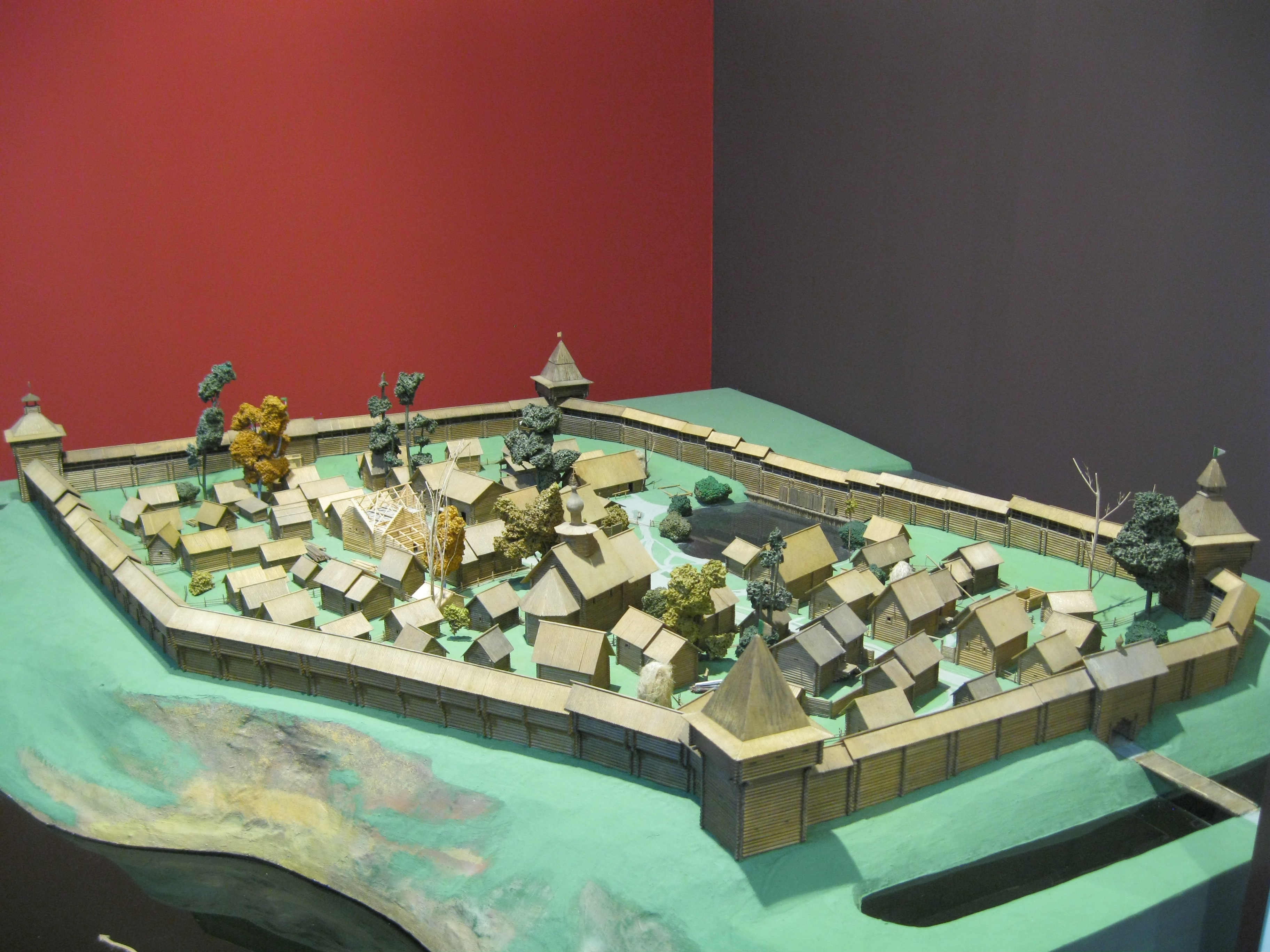 Царевококшайск (современная Йошкар-Ола) в XVII веке. Макет из фондов Национального музея Республики Марий Эл. Автор проекта — А. И. Галицкий, макет — Ю. Д. Александров